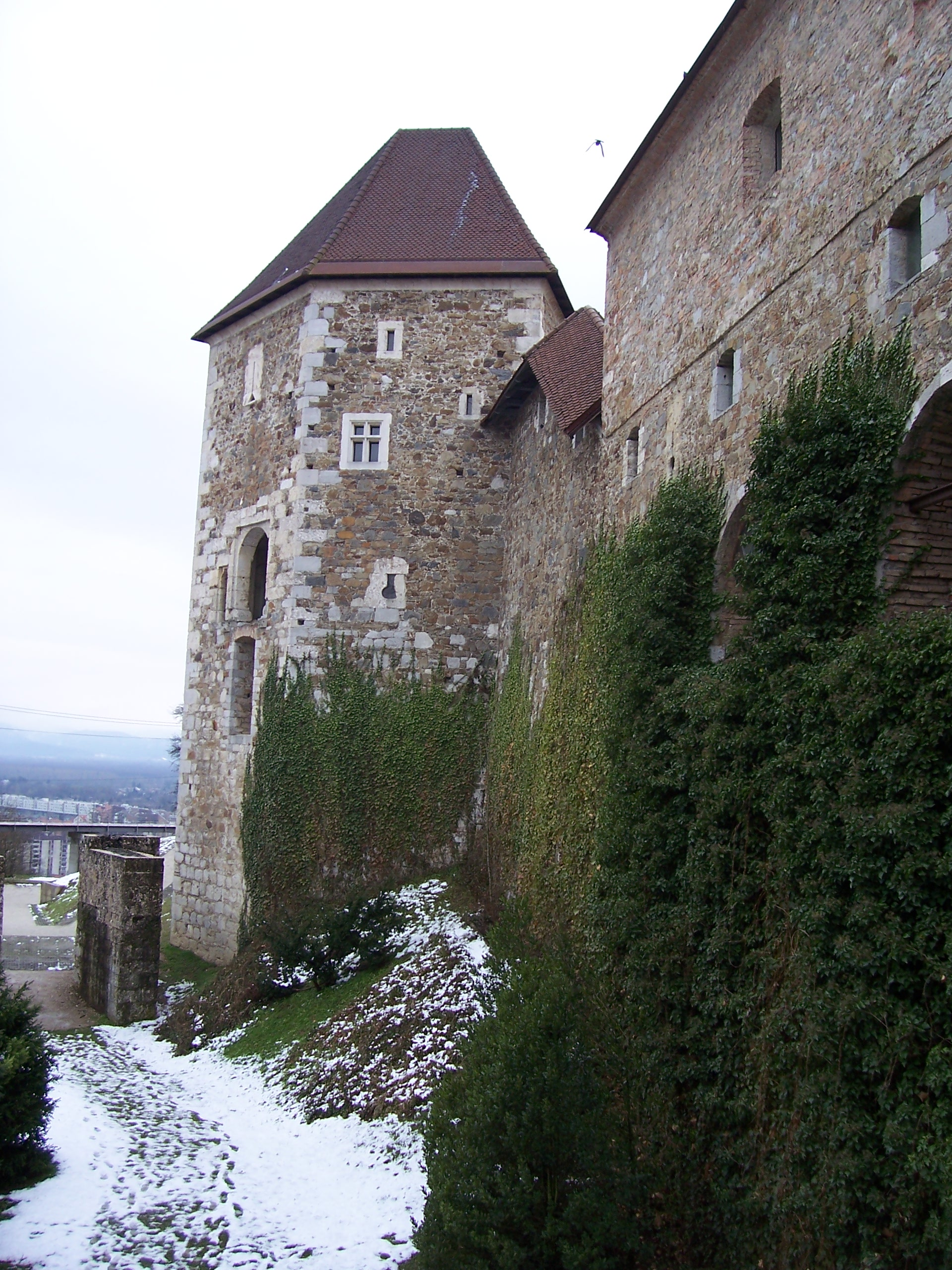 Facciata del Castello di Lubiana